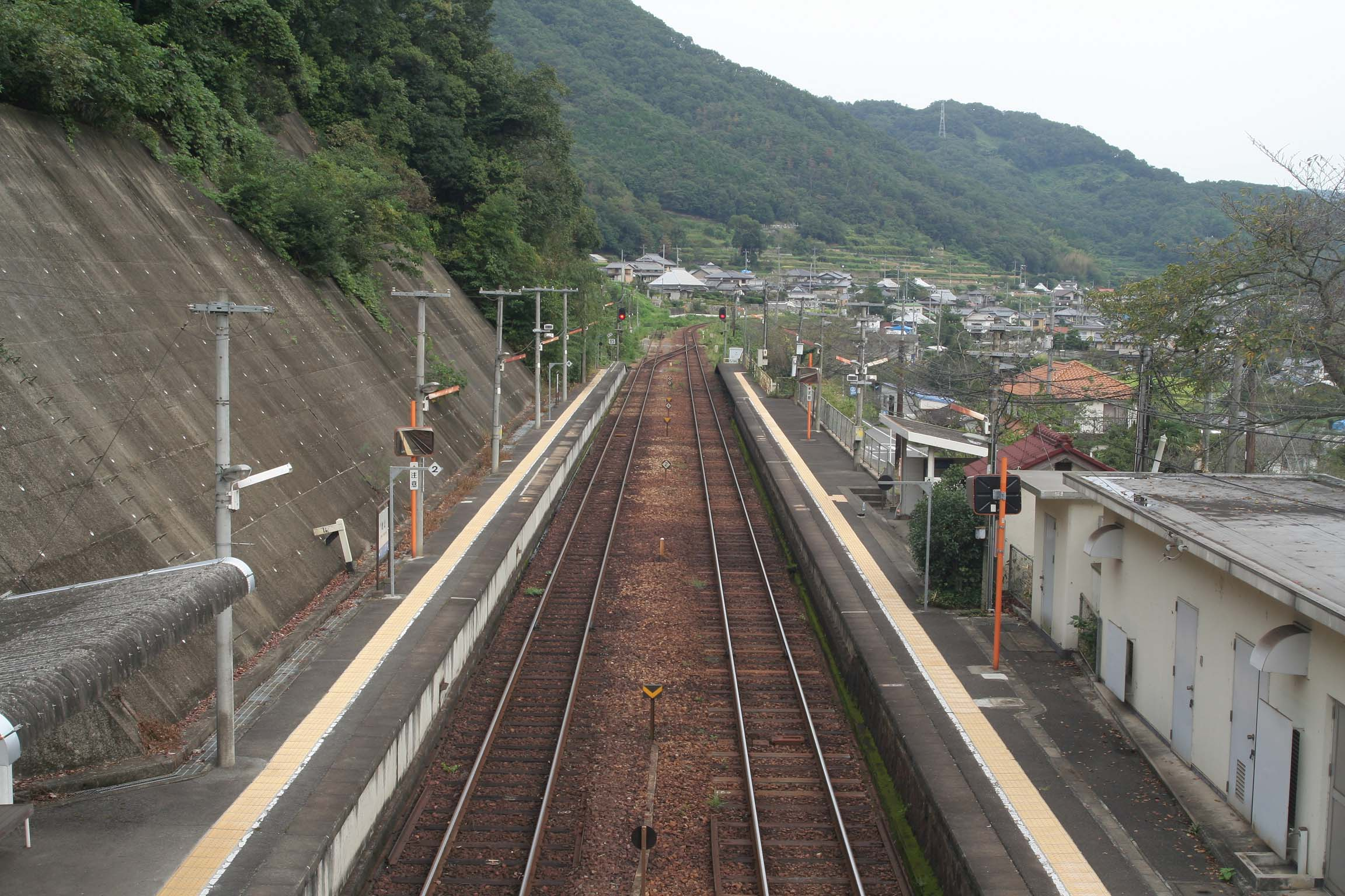 牧山駅の構内